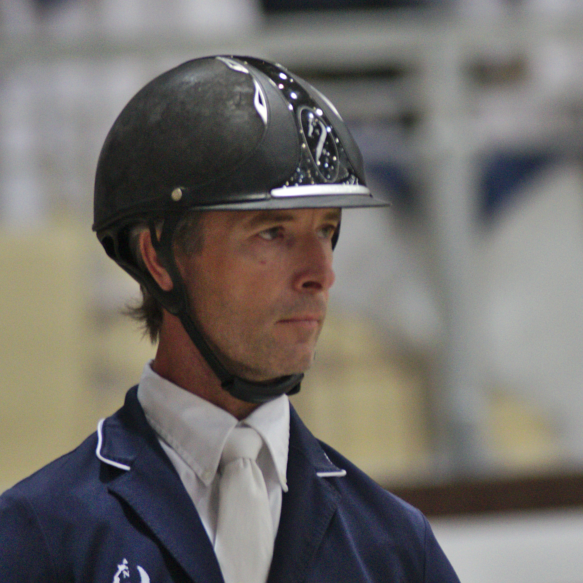 CHI Genève 2013 - 20131214 - Richard Spooner et Chivas Z